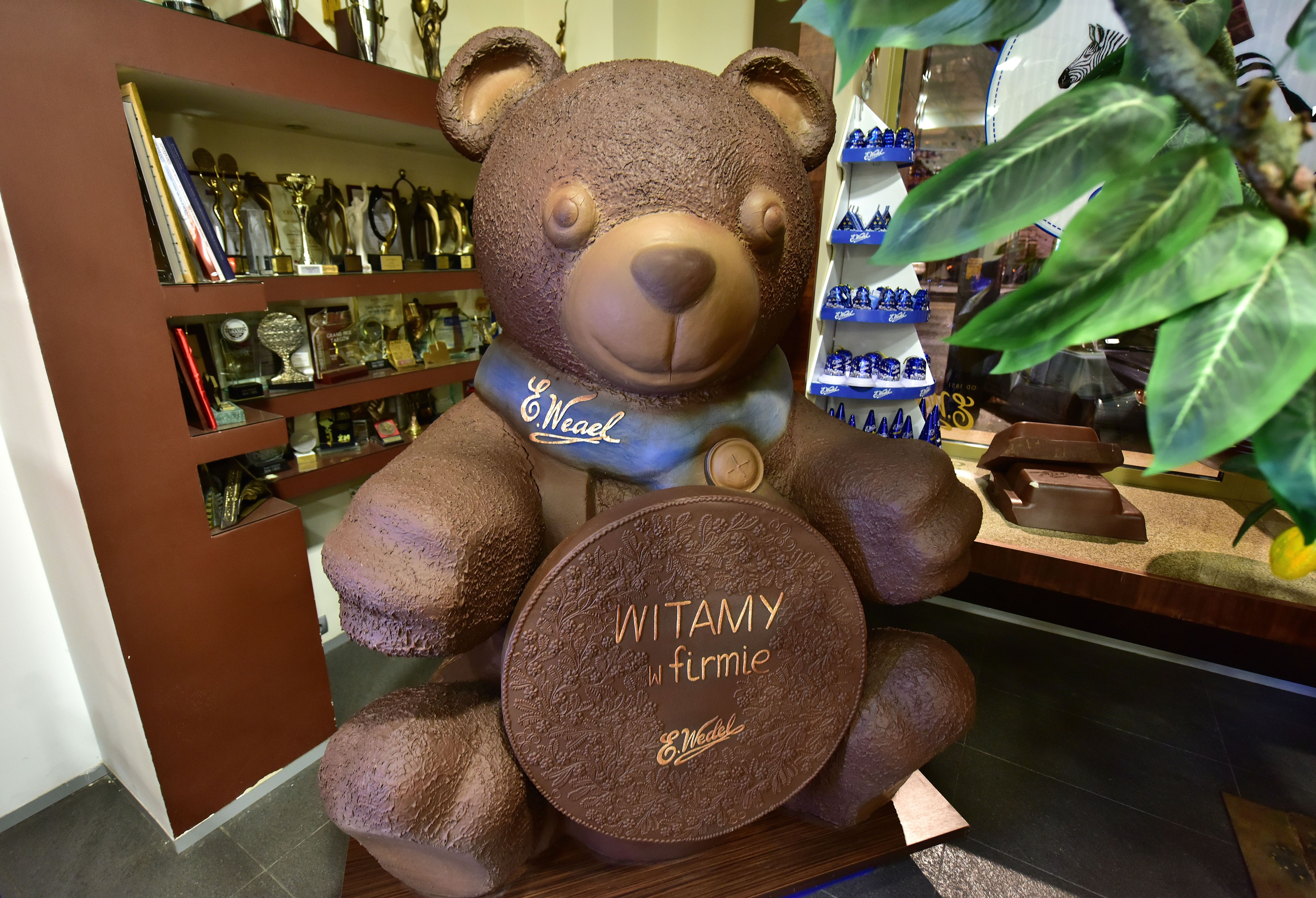 Rzeźba wykonana z czekolady w fabryce Lotte Wedel w Warszawie